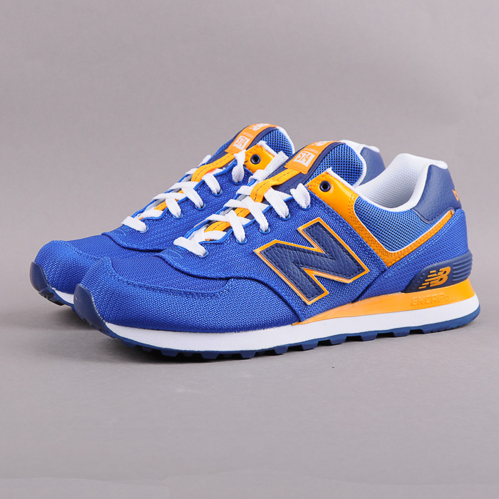 Model vyšel v rámci New Balance Passport Pack, který odkazuje na barvy leteckých společností ve 40. letech minulého století.